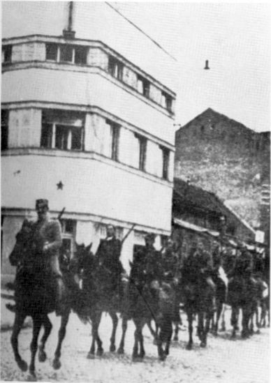 Srpskohrvatski / српскохрватски: Konjicki eskadron Užickog partizanskog odreda u oslobođenom Užicu 1941.